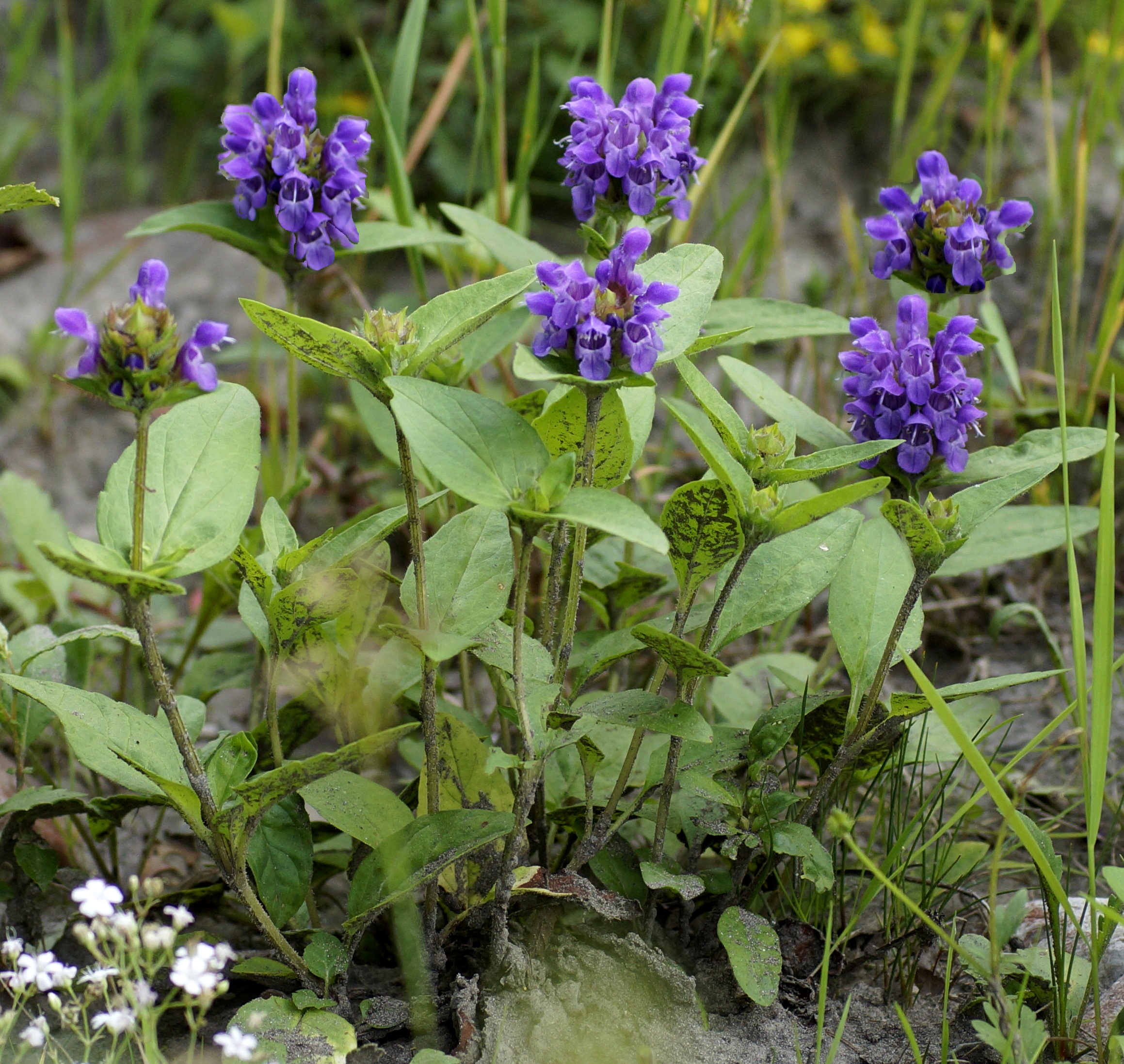 Großblütige Brunelle, Lamiaceae Deutschland, Oberstdorf, Stillachtal, 940 m Photo: U.Schmidt, 17.VII.2013